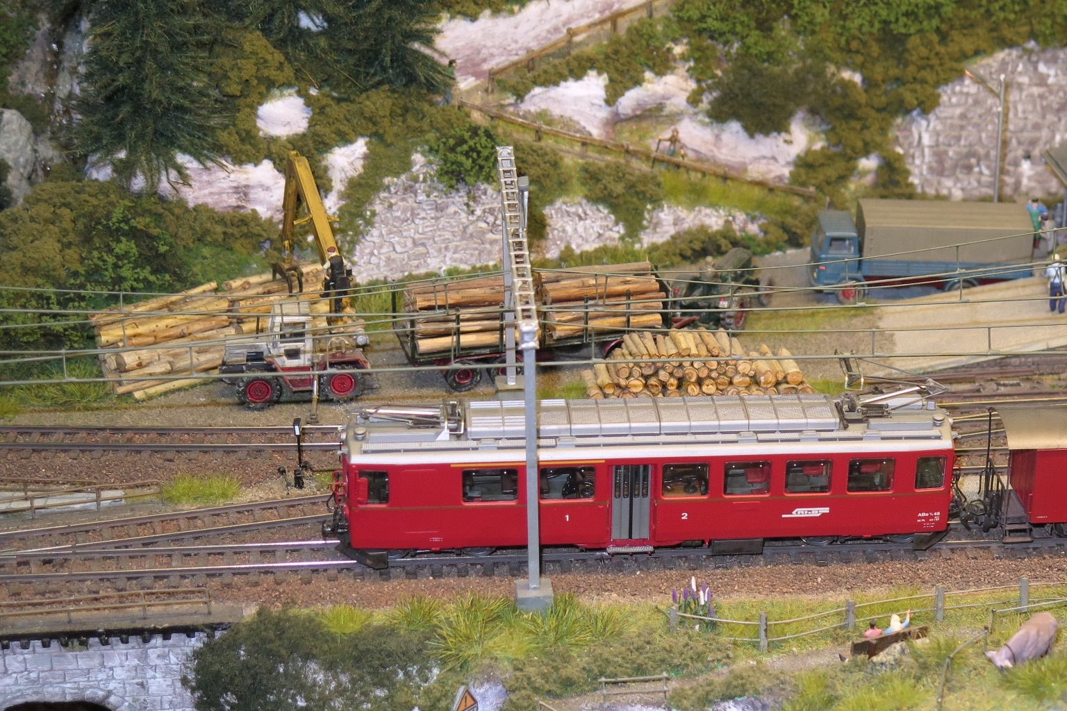 Detail der Modelleisenbahnanlage St. Bernina der Rhätischen Bahn (RhB) in der Spur H0m im Massstab 1:87. Diese Modelleisenbahnanlage wurde unter anderem an der 35. Expo-Trains Luxembourg in Walferdangeim Grossherzogtum Luxemburg am 7. und 8. November 2015 ausgestellt. Von dieser Ausstellung stammt auch das Foto.